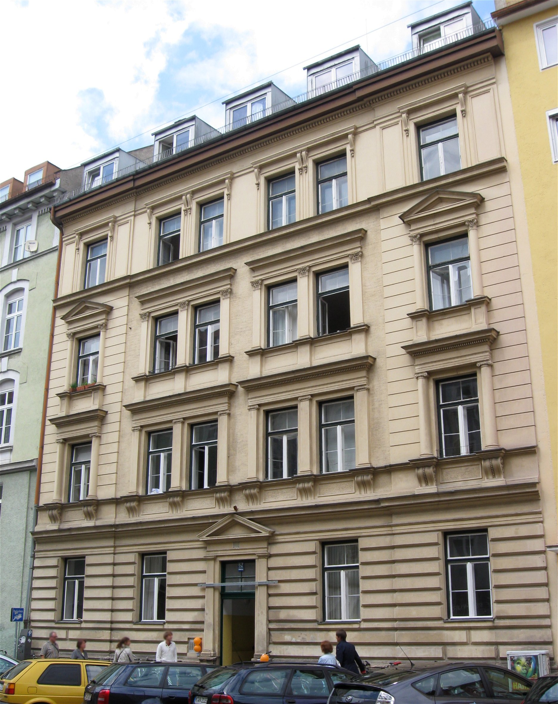 Adalbertstraße 62; Mietshaus, viergeschossiger Neurenaissancebau mit Seitenrisaliten und reich gegliederter Fassade, errichtet von Karl Stiersdorfer 1887/88.